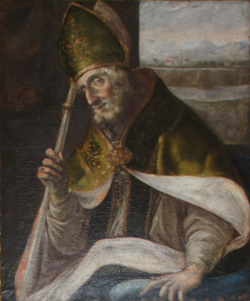 Porträtgemälde von Waldo, Bischof von Freising, im Fürstengang zwischen Fürstbischöflicher Residenz und Freisinger Dom.